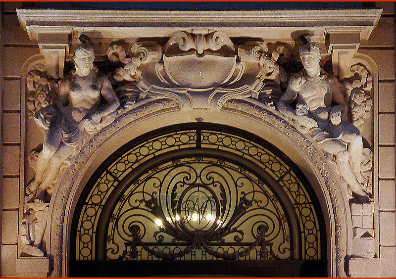 Detalhe da fachada do Santander Cultural, Porto Alegre, Brasil. Esculturas de Fernando Corona